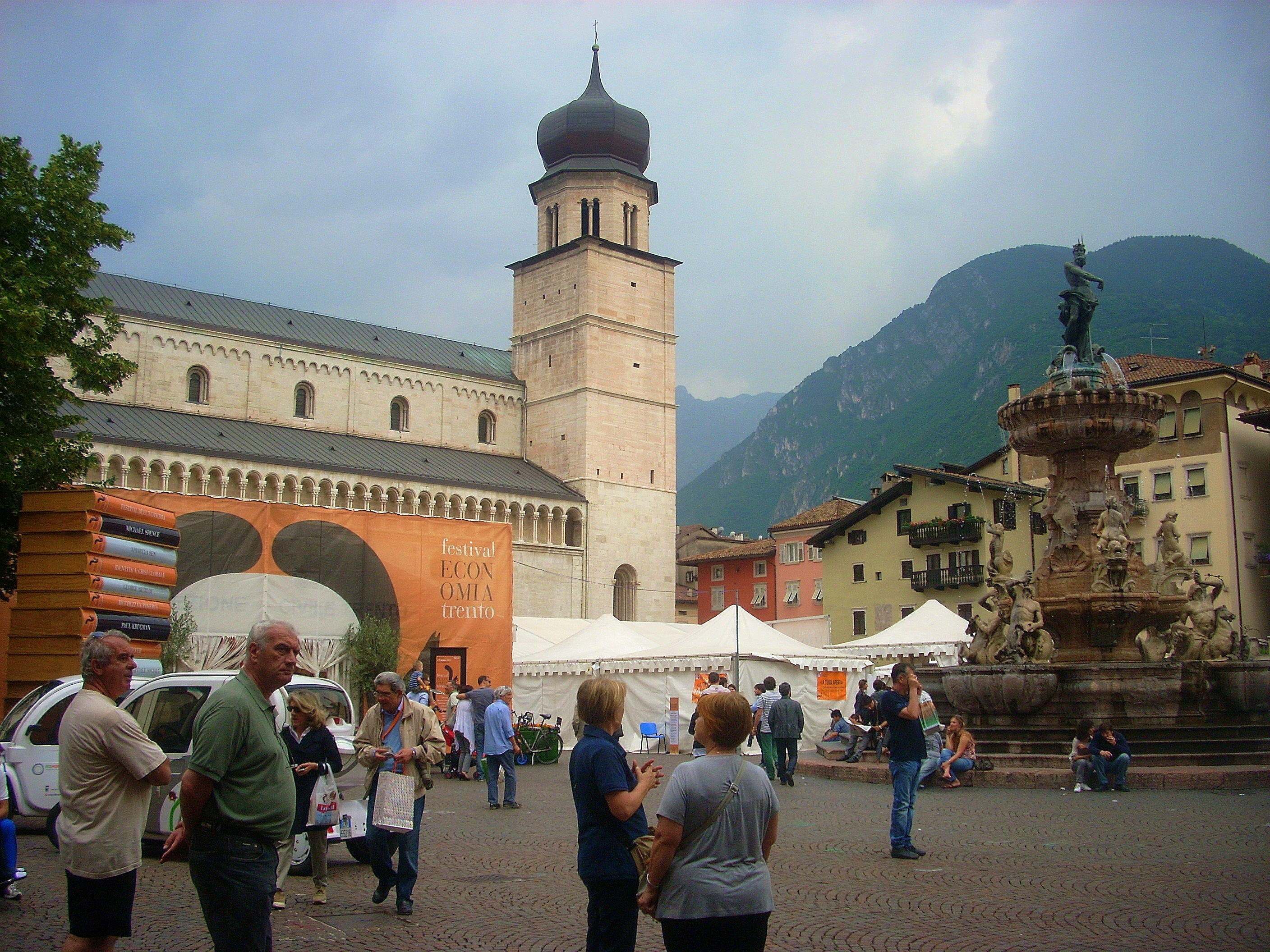 Piazza Duomo a Trento in occasione del 6° Festival dell'Economia